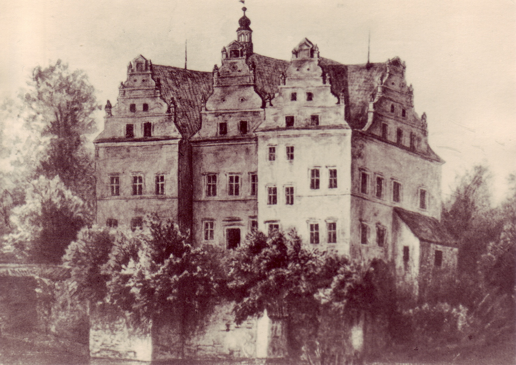 Wilków Wielki - dwór (zabytek nr 466)